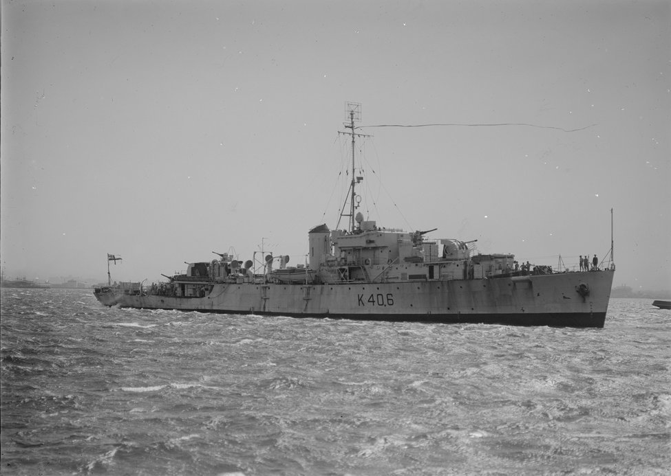 HMAS Barwon